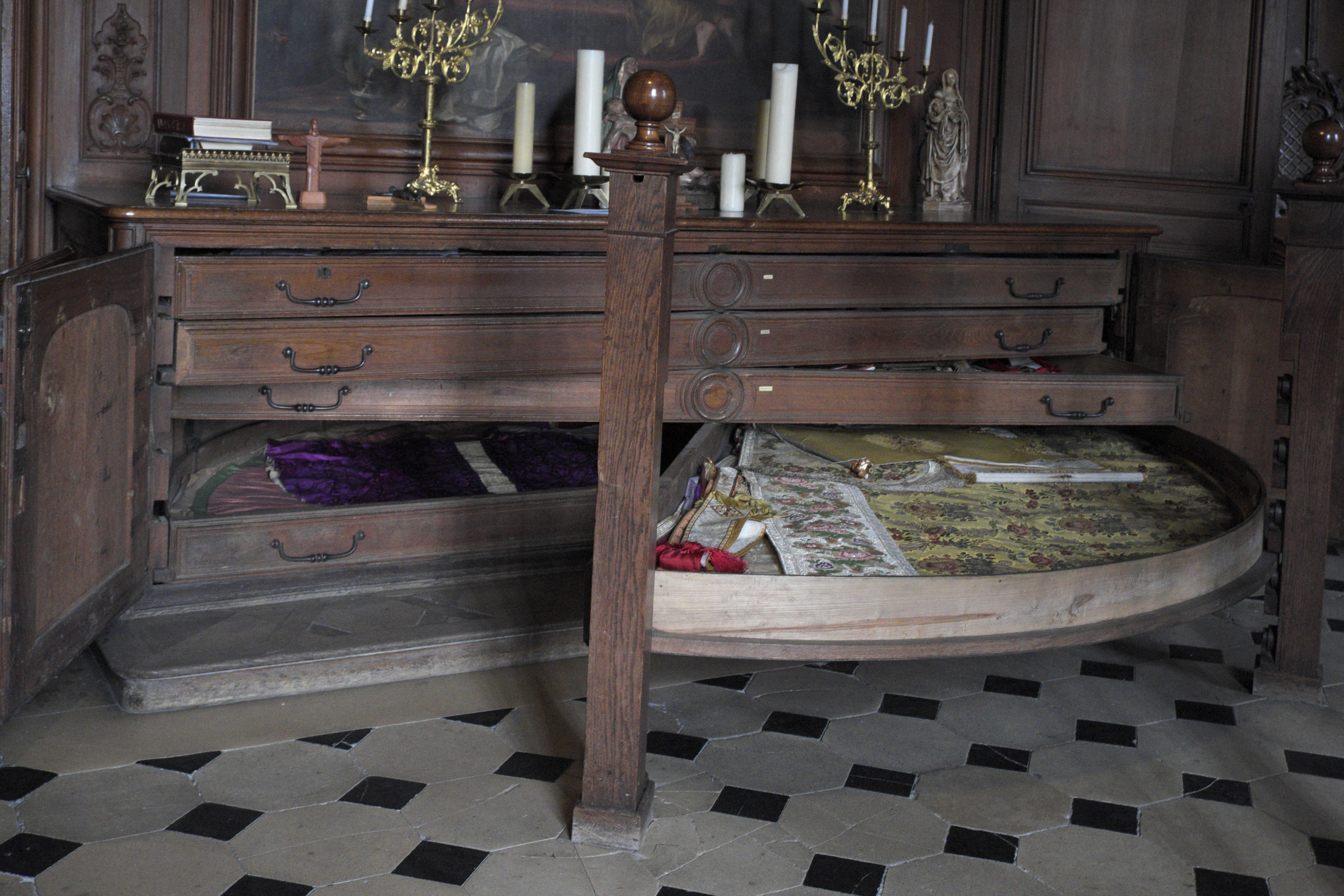 Katholische Pfarrkirche Saint-Martin in Longjumeau im Département Essonne (Île-de-France/Frankreich), Schrank in der Sakristei für die Aufbewahrung von Messgewändern